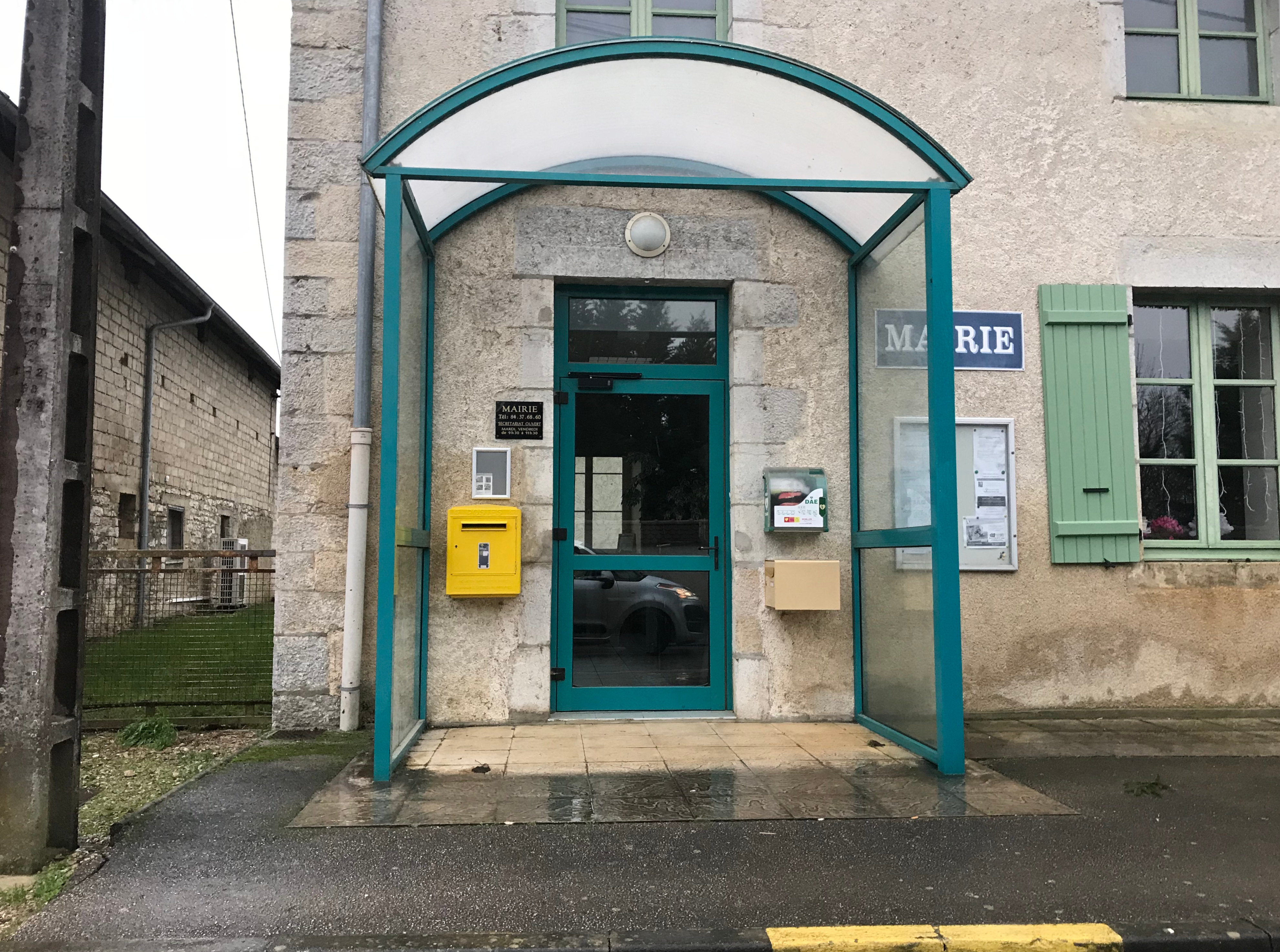 Image de Écleux (Jura, France) en janvier 2018.